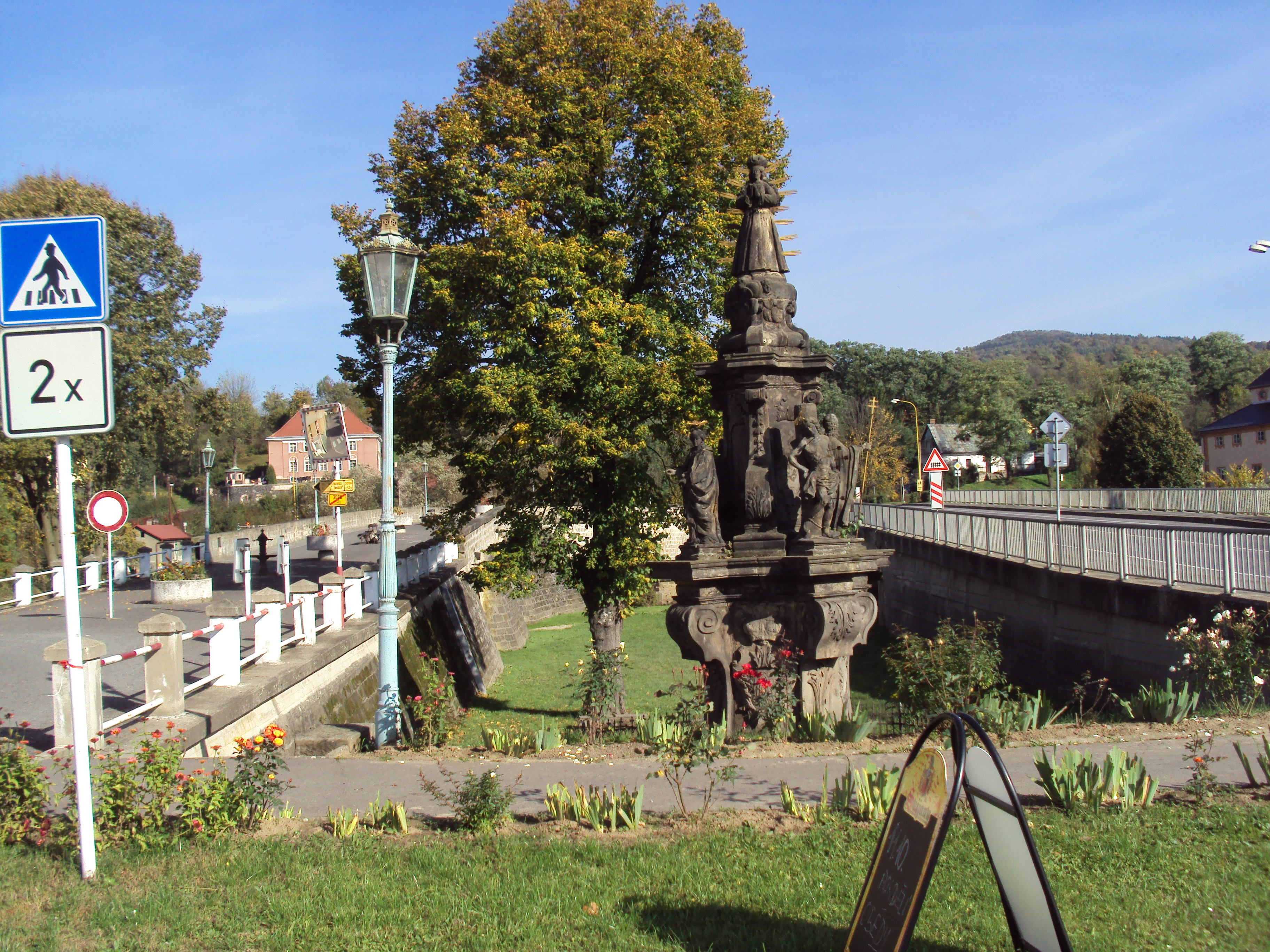 Sousoší mezi mosty přes Ploučnici